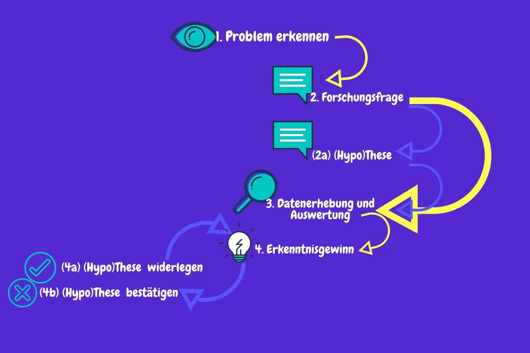 Forschungsfrage